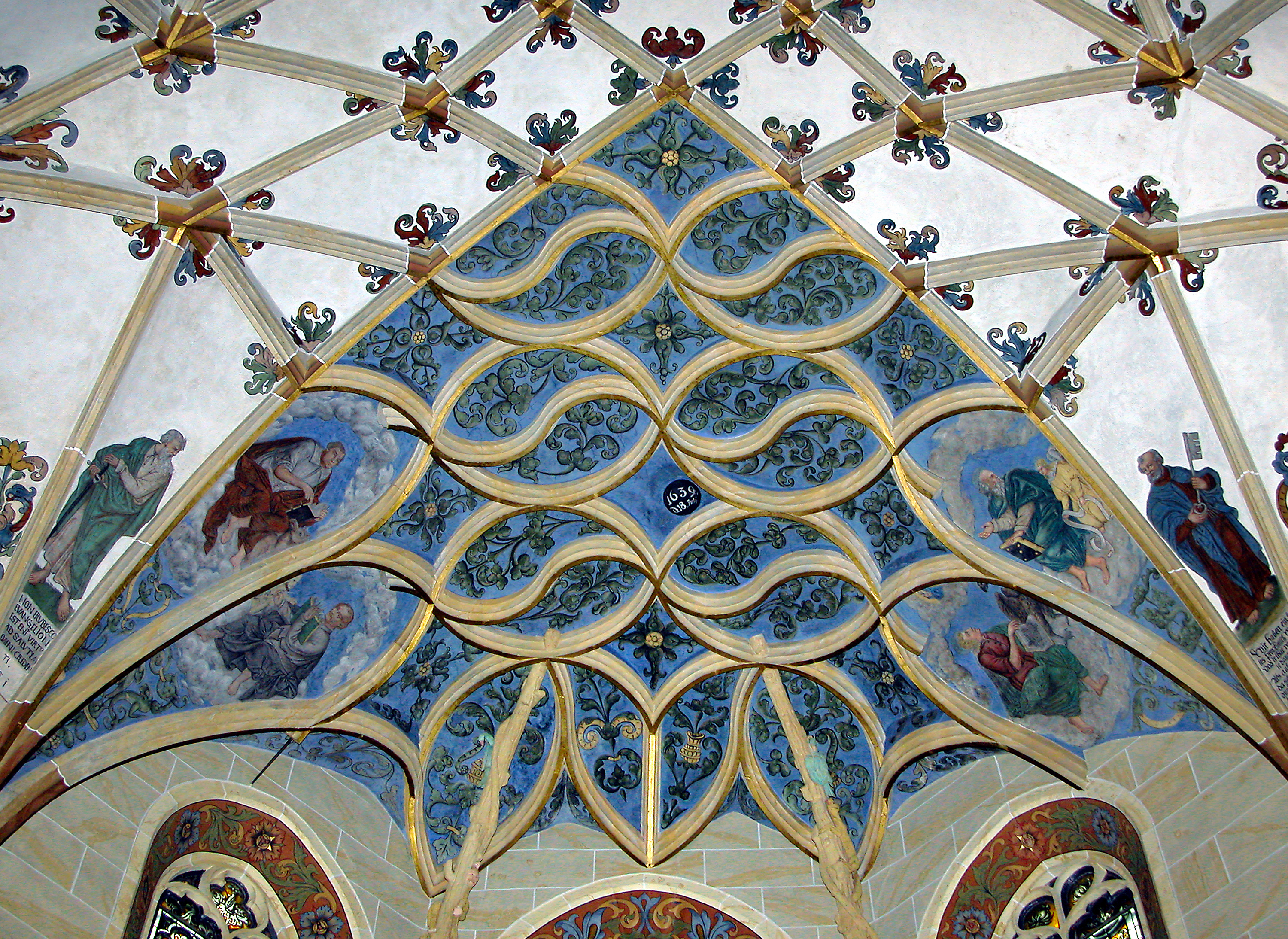 04.10.2008 01796 Pirna-Altstadt: Stadtkirche St. Marien, Kirchplatz (50.962419,13.943554). Heutiger Bau 1502-1546. Hauptmeister Peter Ulrich. Fischblasenrippengewölbe über dem Altarraum. Die Kanonenkugel der schwedischen Truppen von 1639 ist hier eingemauert. [DSCN34450.TIF]20081004035DR.JPG(c)Blobelt